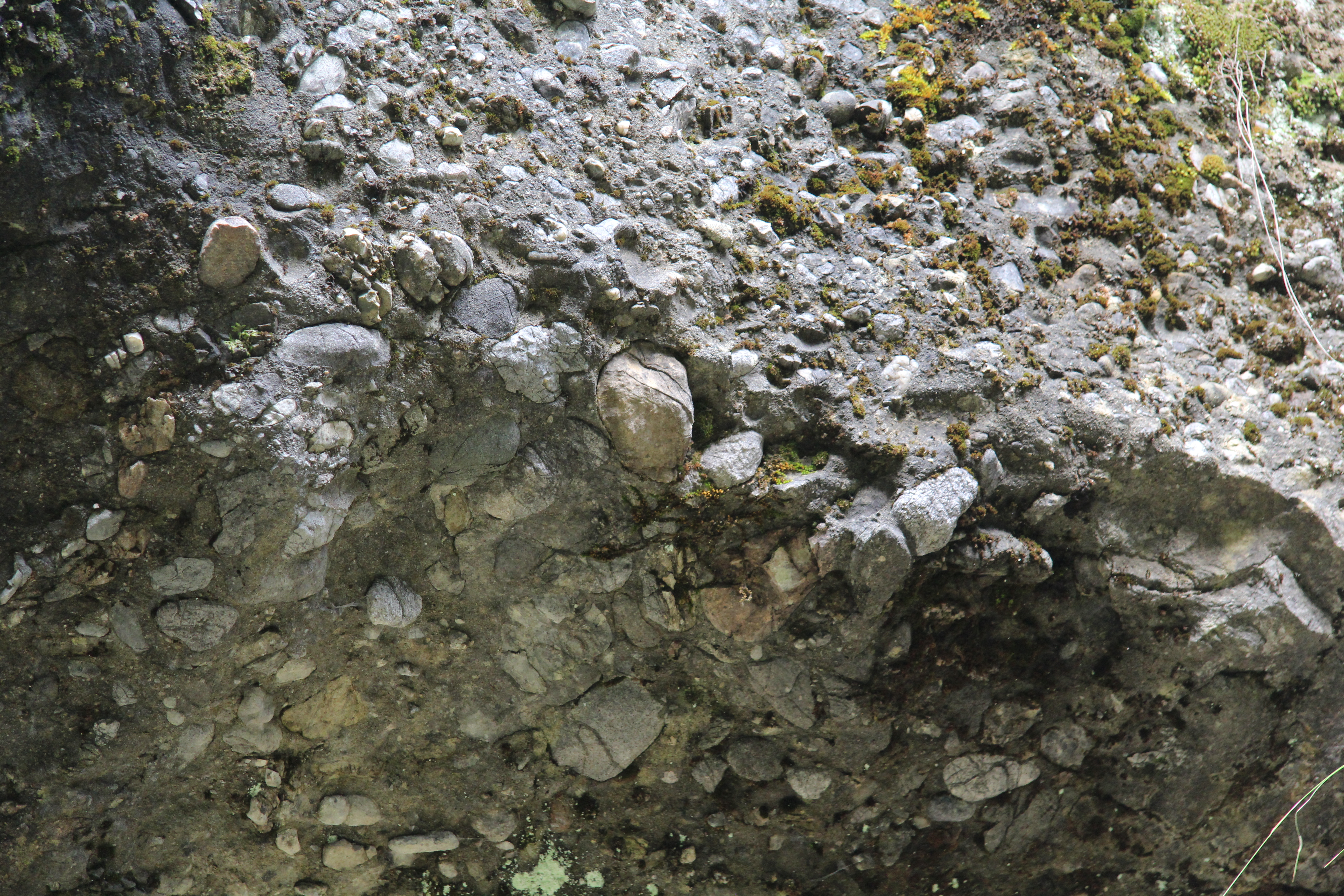 Außer Kalkstein findet man auch erhebliche Anteile von Konglomerat im Königsteingebirge bei Zarnesti (Rumänien)